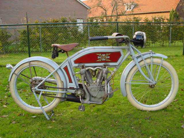 Toestemming van Yesterdays Antique Motorcycles